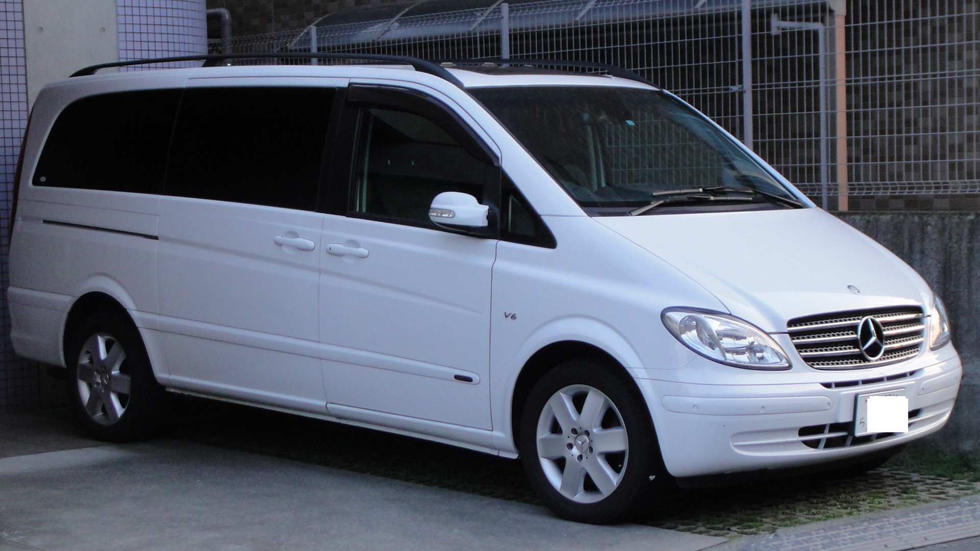 メルセデス V350